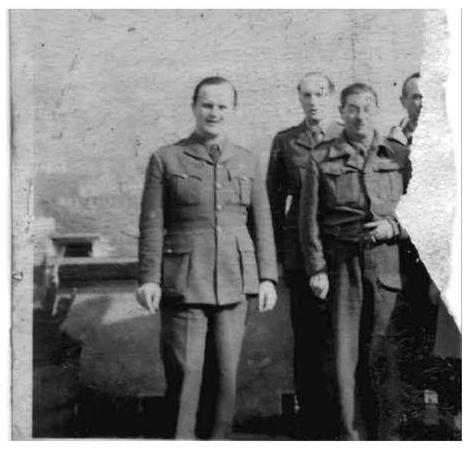 Ian Greenlees, a sinistra, con alcuni commilitoni.